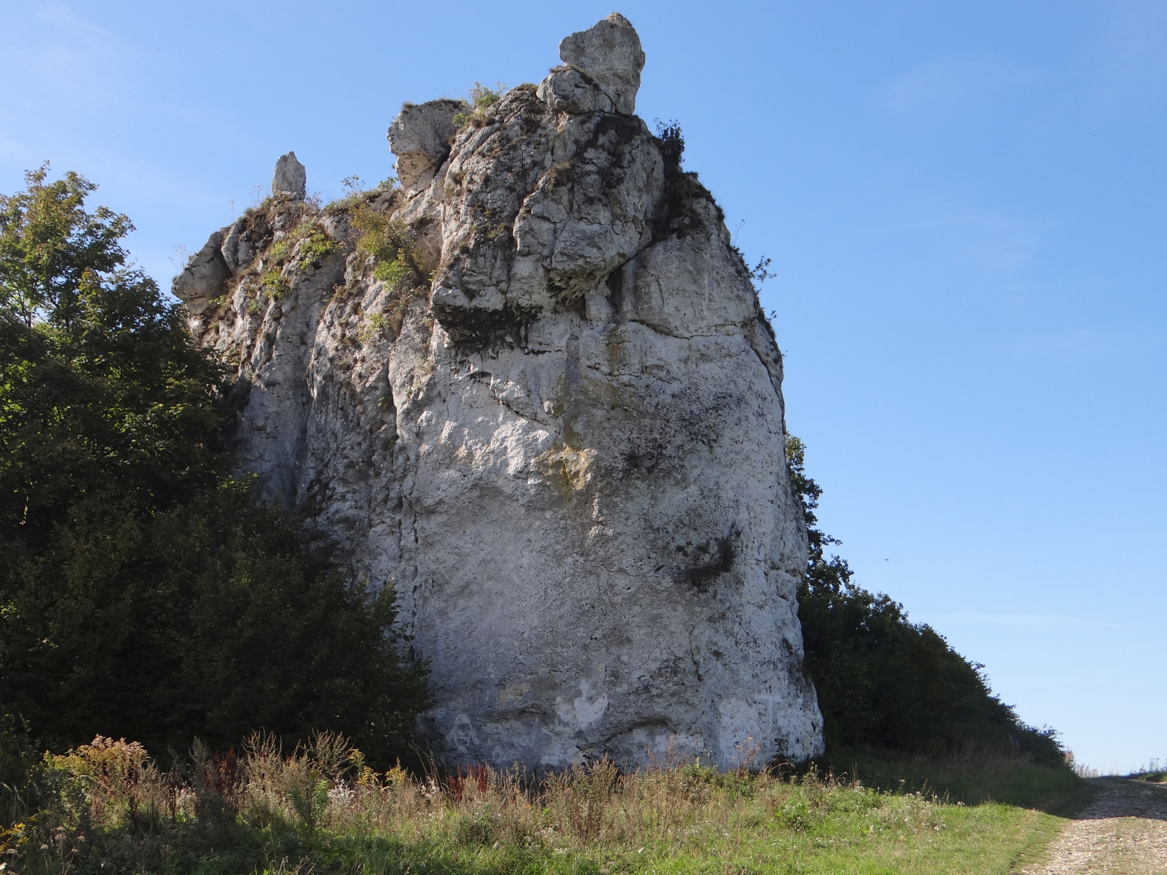 Skała Kapucyn w grupie skał na wzgórzu 502 (Grodzisko) w Jerzmanowicach